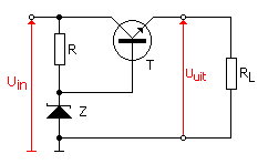 Basiswerking van een zener-diode, wordt gebruikt om de werking van een 78xx spanningsregelaar toe te lichten.